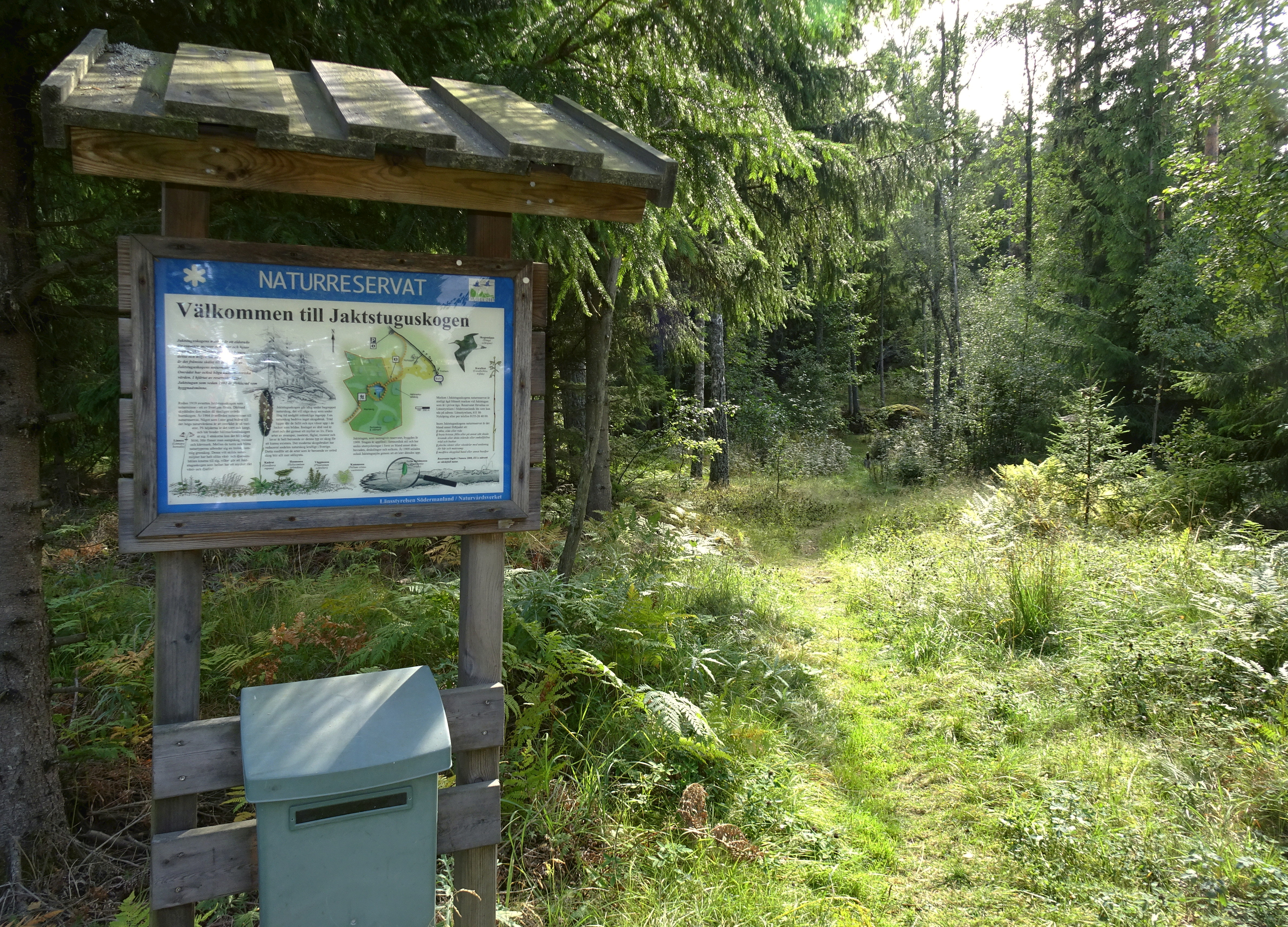 Jaktstuguskogens naturreservat